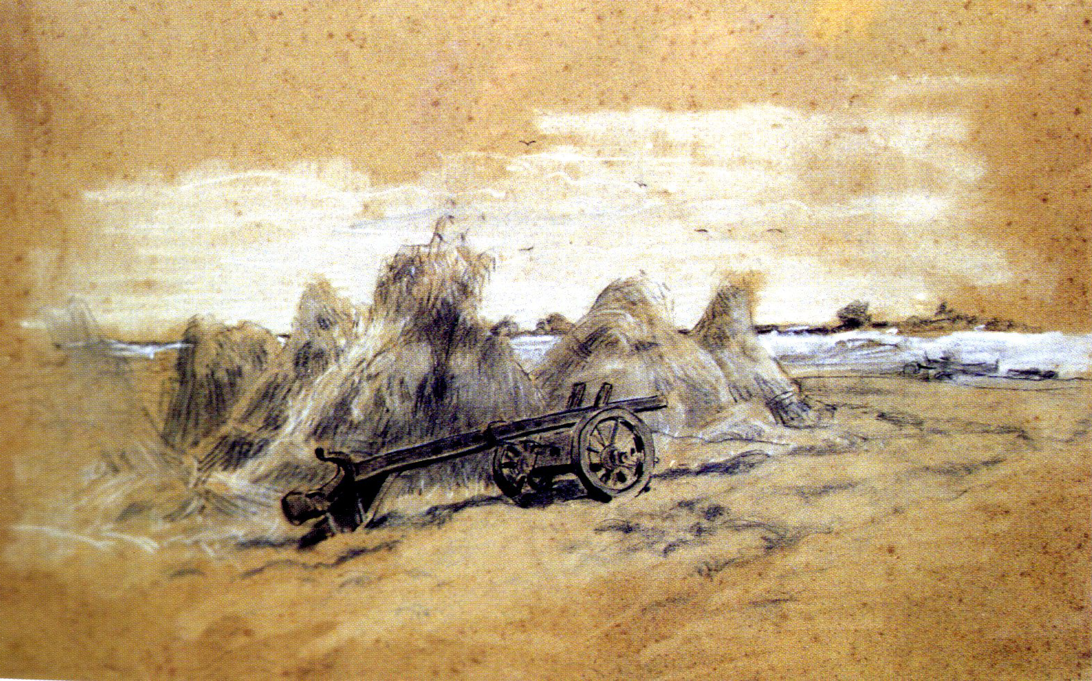 Korenschoven door Maria Philippina van Bosse (1837-1900)